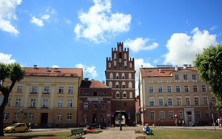 Bartoszyce - miasto w woj. warmińsko-mazurskim, w powiecie bartoszyckim